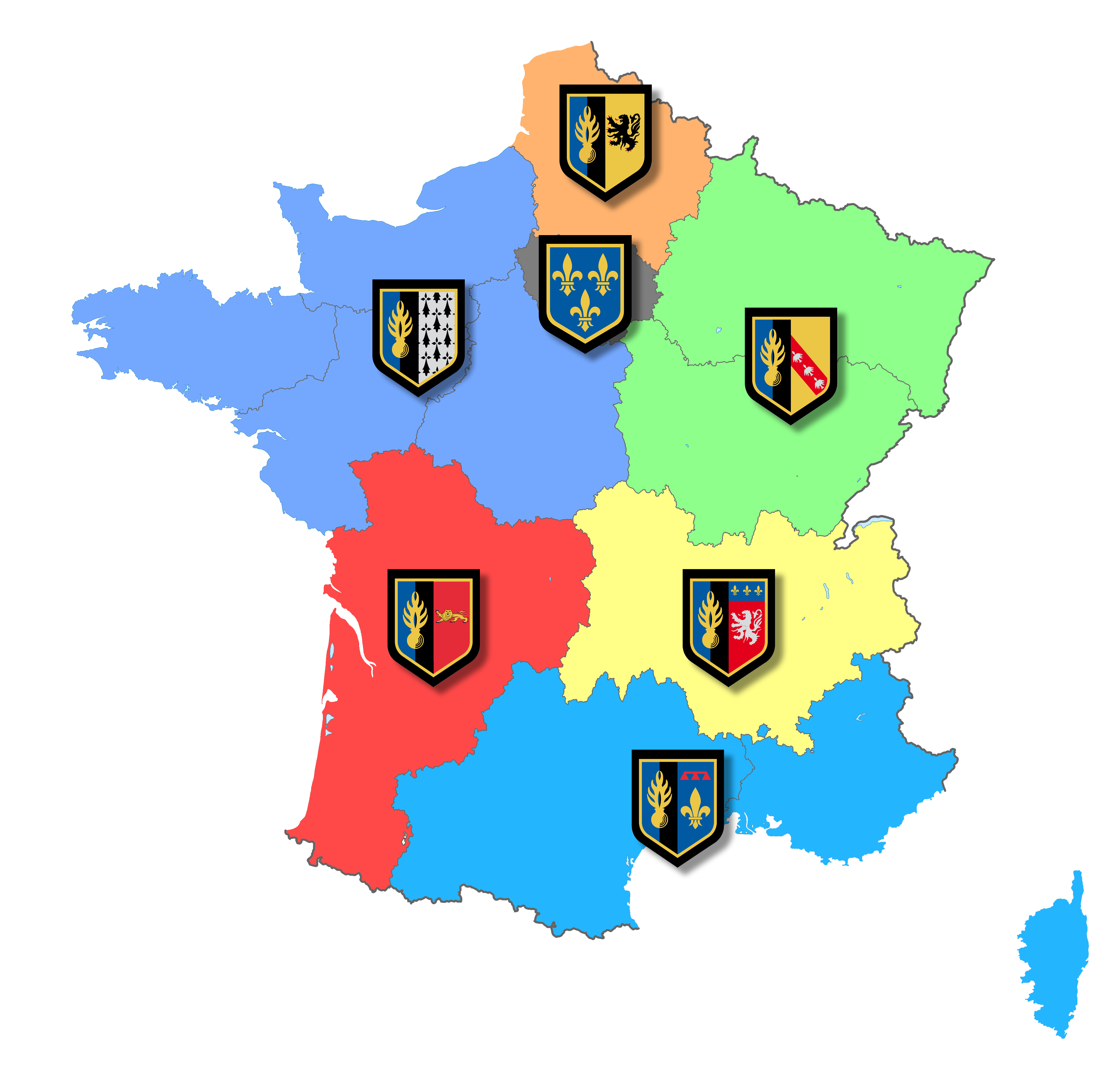 Carte des régions zonale de la Gendarmerie depuis le 1er janvier 2016. Région de Gendarmerie d'Île-de-France Région de Gendarmerie de Bordeaux Région de Gendarmerie de Rennes Région de Gendarmerie de Sathonay-Camp Région de Gendarmerie de Marseille Région de Gendarmerie de Metz Région de Gendarmerie de Lille